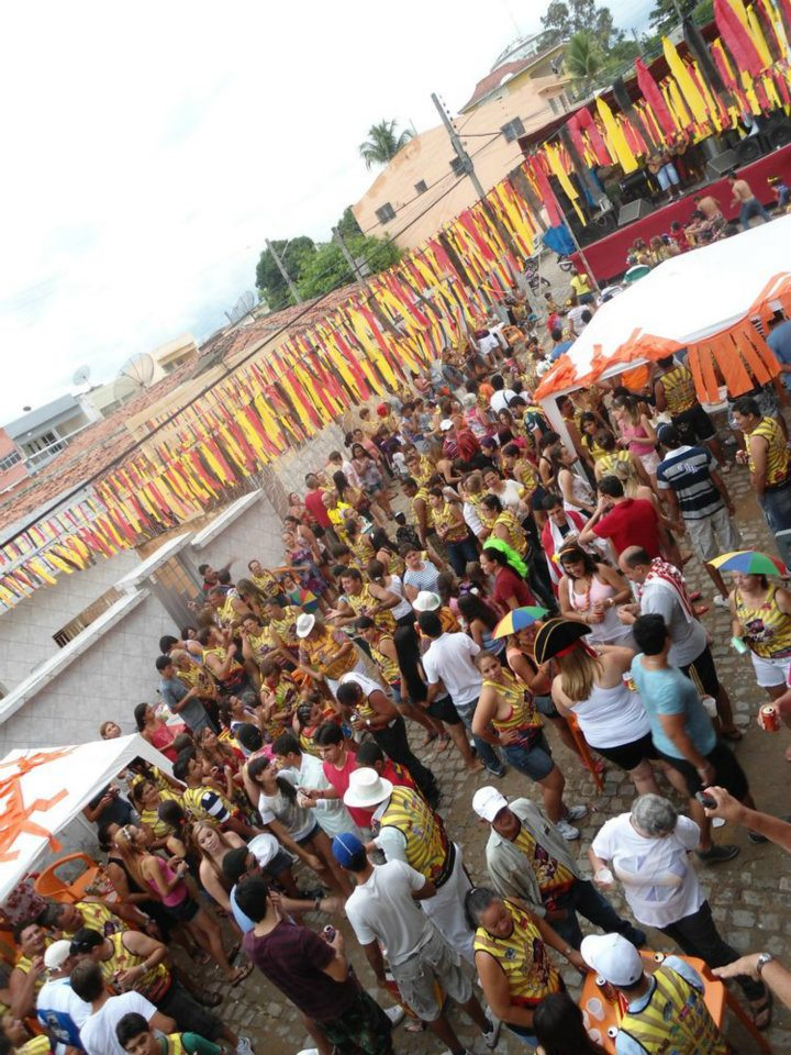 Bloco SportFolia - Ano II